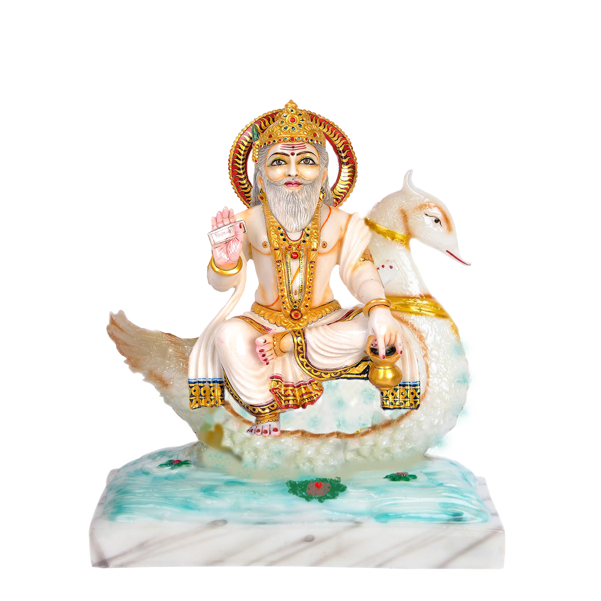 Deva Silpi Viswakarma1.png